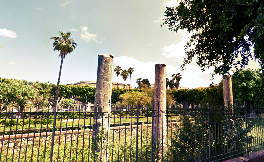 Colonne d'epoca romana (Foro Siracusano)